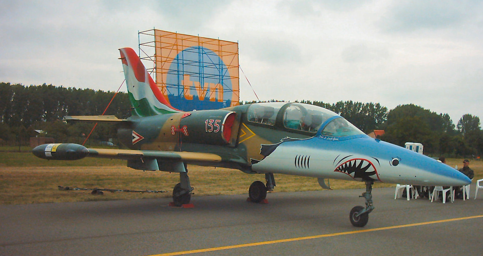 Aero L-39 Albatros na pokazie AirShow 2007.